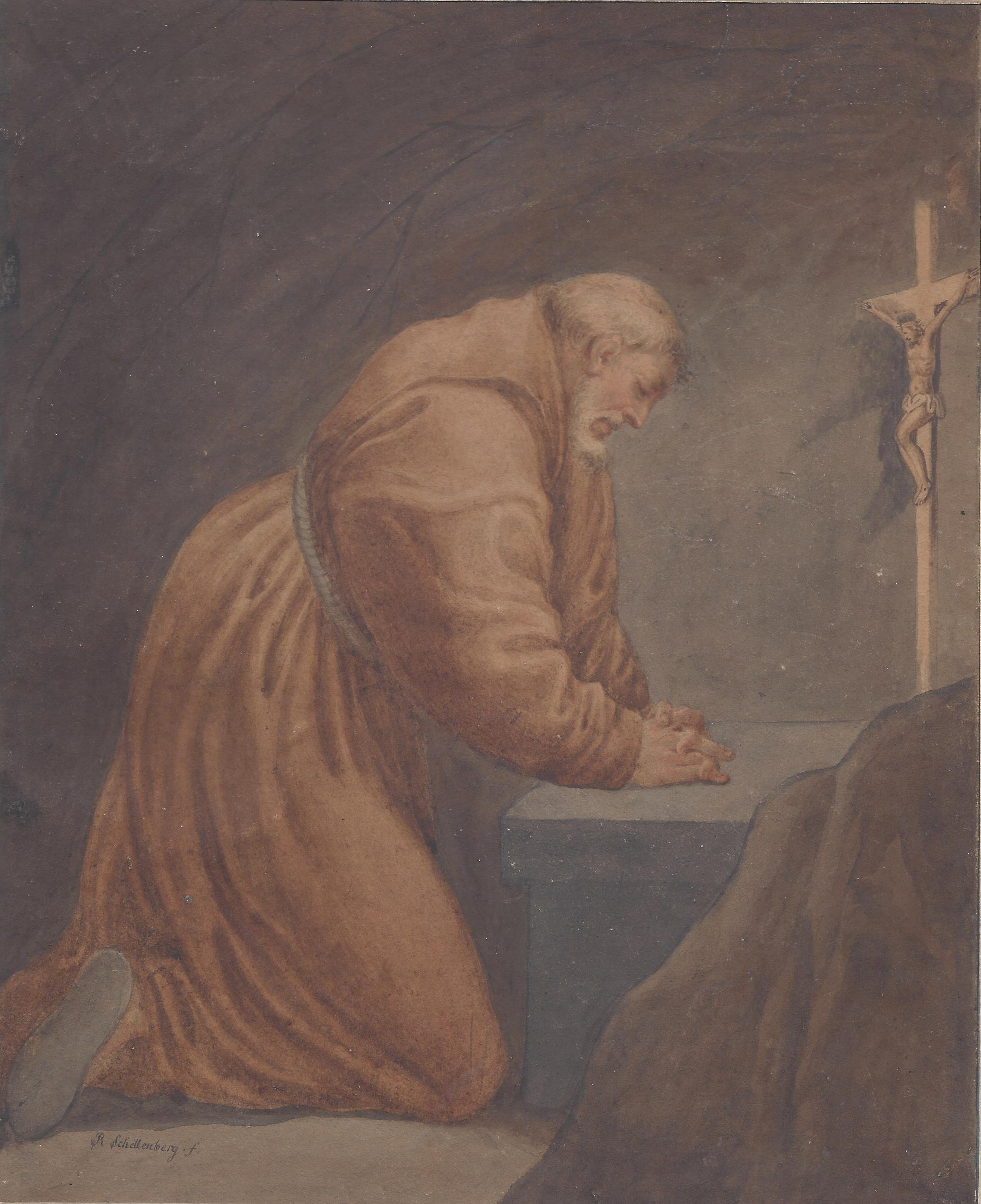 Johann Rudolf Schellenberg (Signatur R. Schellenberg): Kapuziner im Gebet. Aquarellierte Zeichnung um 1780